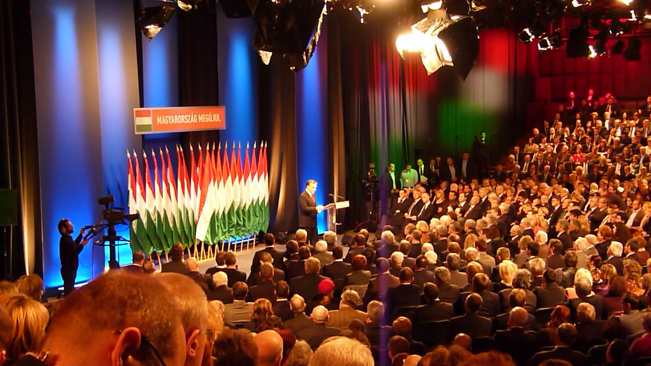 2011. február 7-én, hétfő délután Budapesten, a Millenárison mondta el Orbán Viktor a 13. évértékelő beszédét